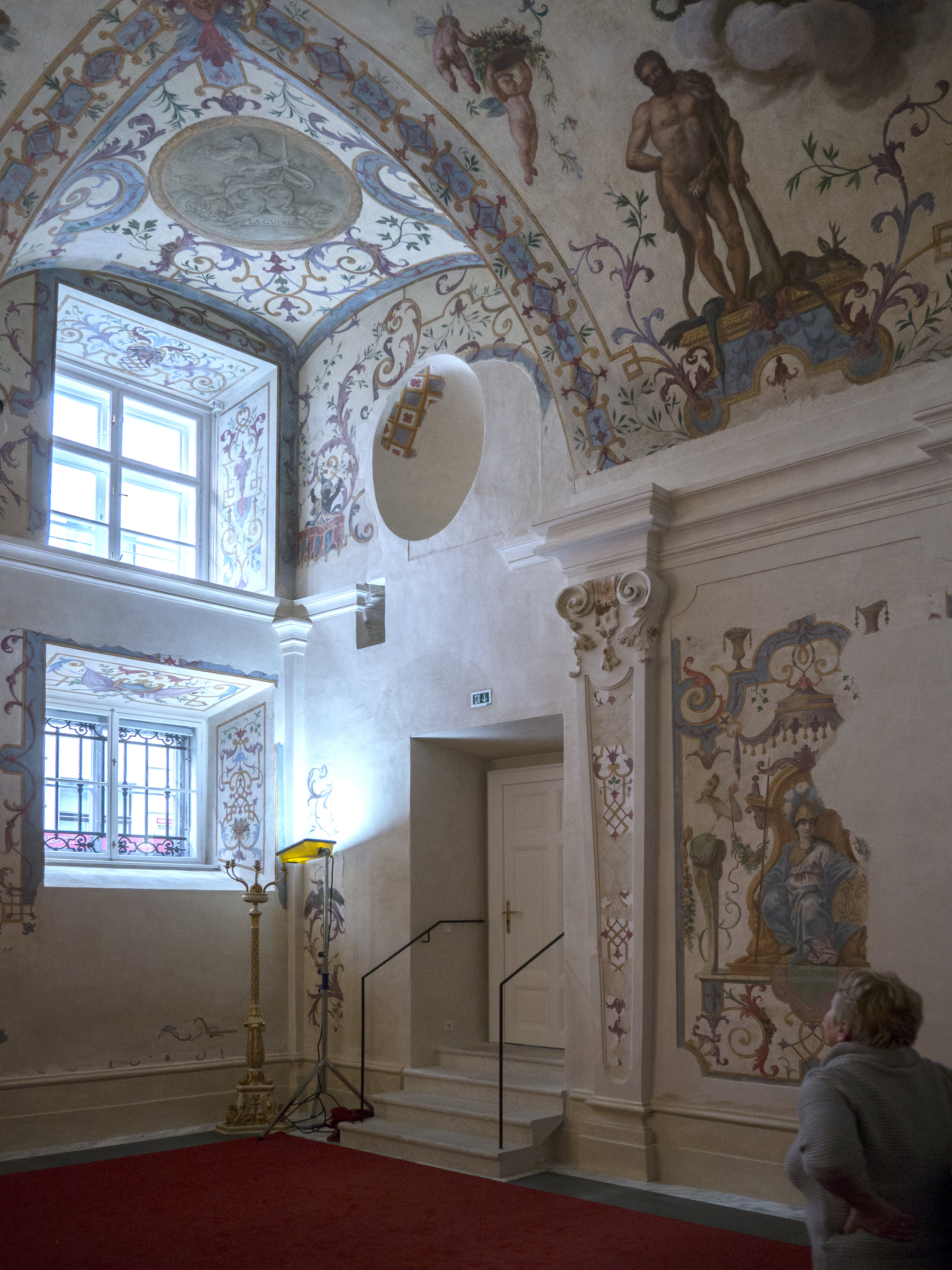 Belvedere – Winterpalais, Sala terrena. Rechts im Bild die Göttin Minerva Dieses Bild wurde anlässlich des österreichischen Tags des Denkmals 2014 in Wien eingereicht.